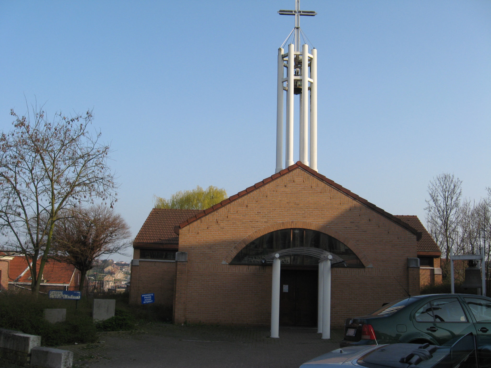 Sint-Lambertuskerk te Montegnée, Saint-Nicolas